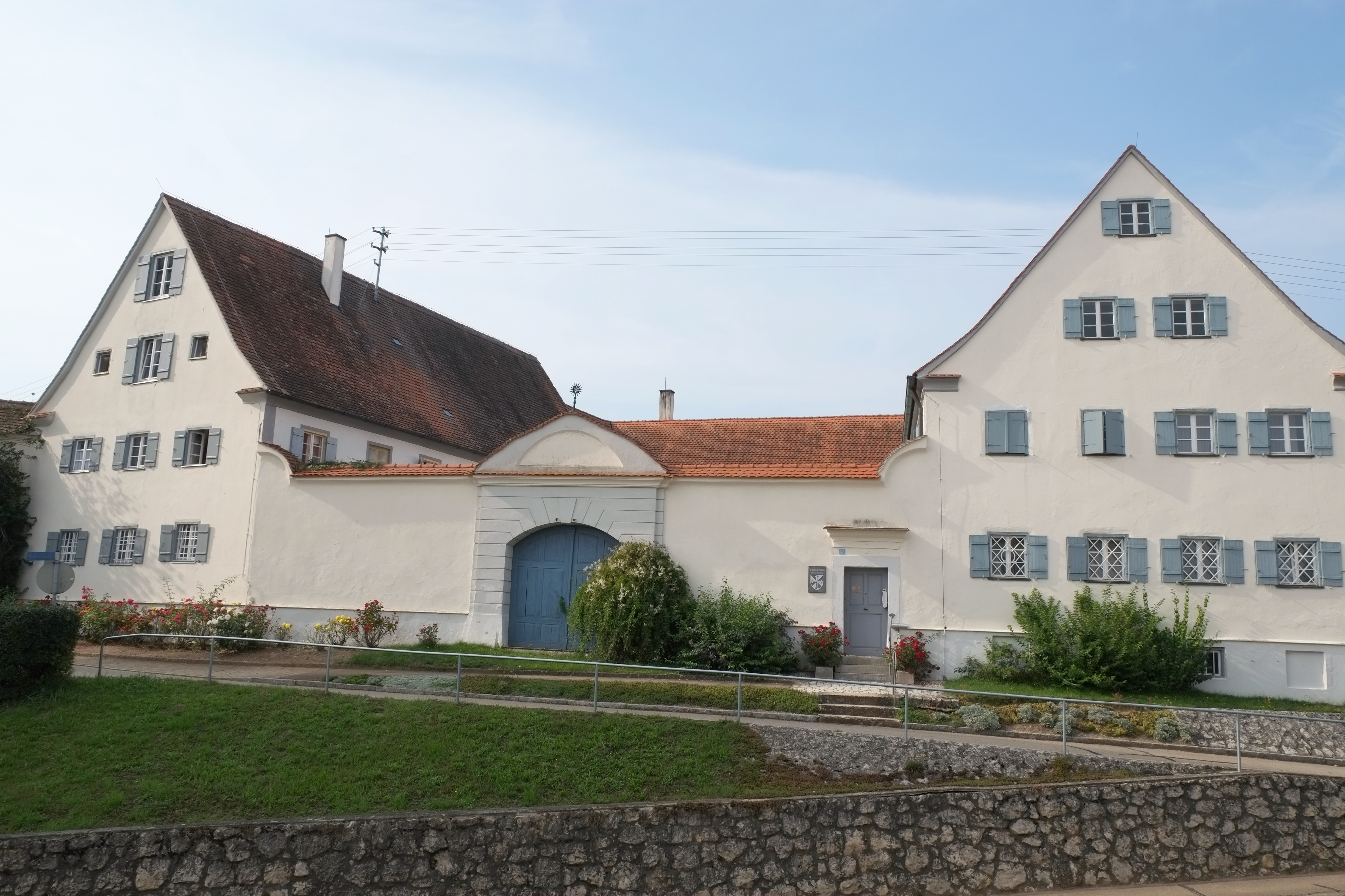 Dominikanerinnenkloster in Fremdingen im Landkreis Donau-Ries (Bayern, Deutschland)